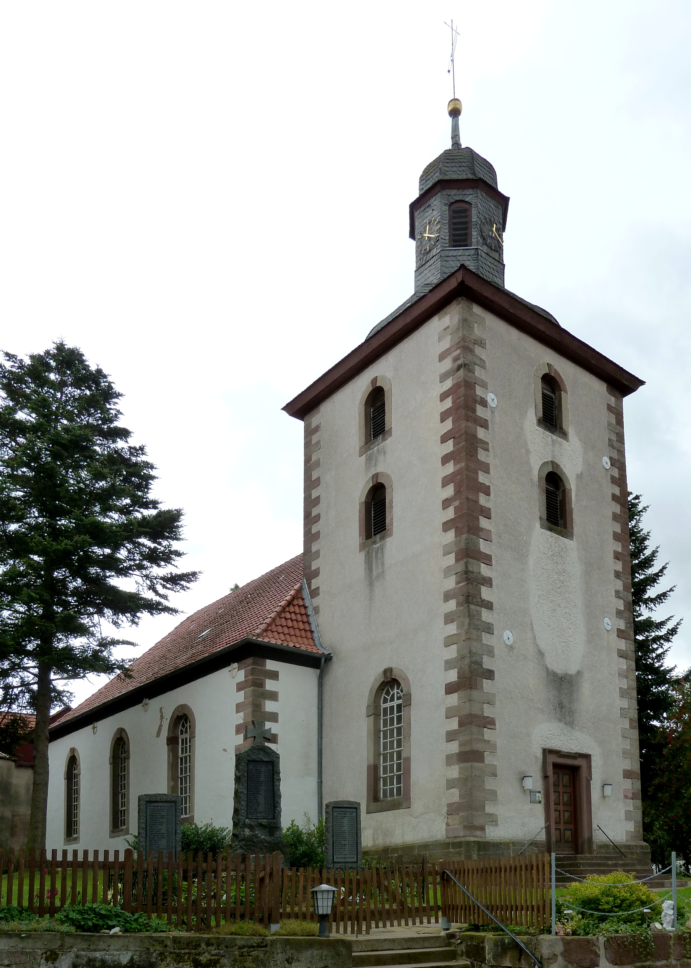 Ev.-luth. Kirche St. Martini in Bischhausen, Gemeinde Gleichen, Niedersachsen. Erbaut 1740–42 durch den Baumeister Jost Philipp Leichtweiß